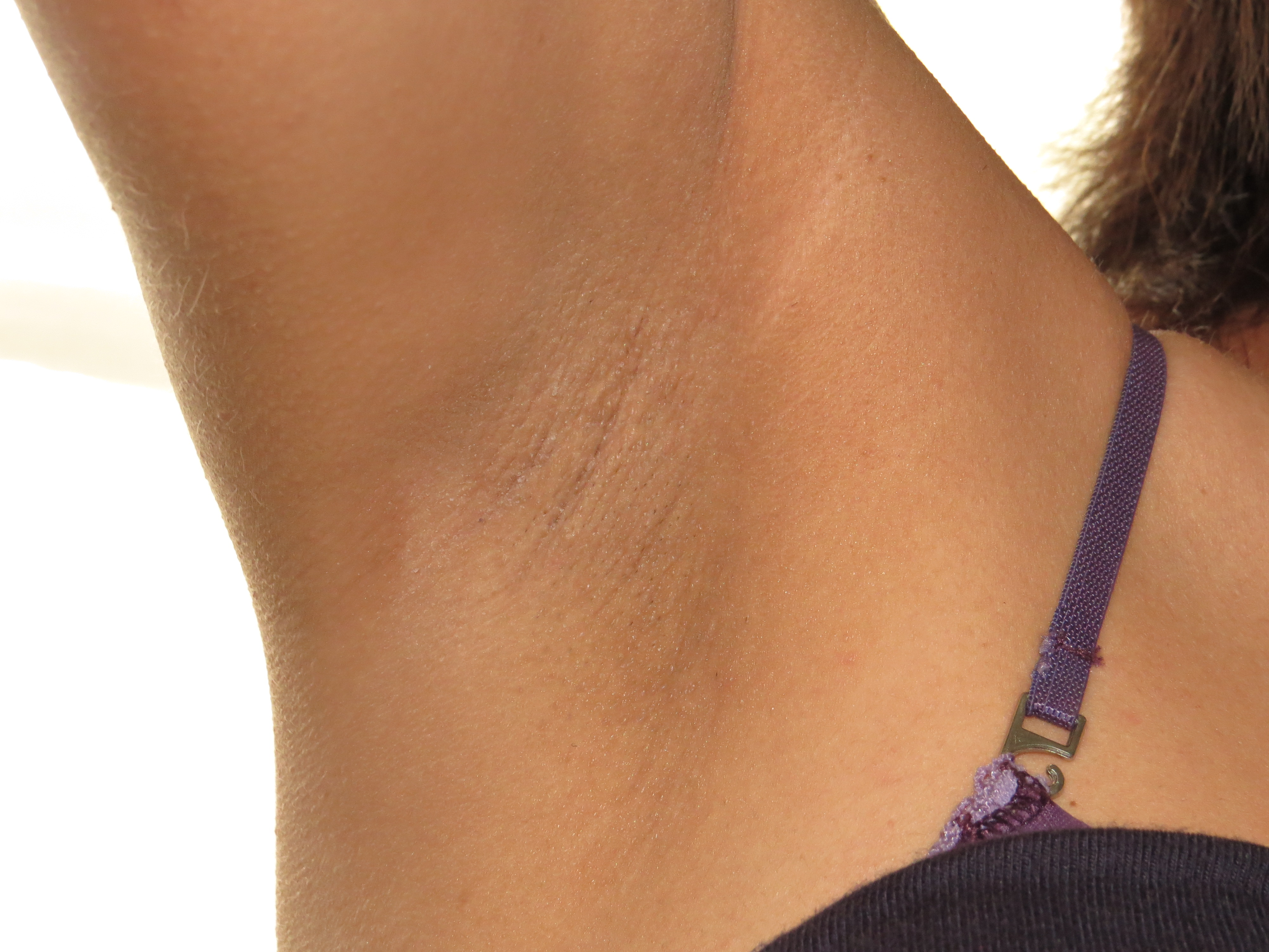 Axila femenina derecha